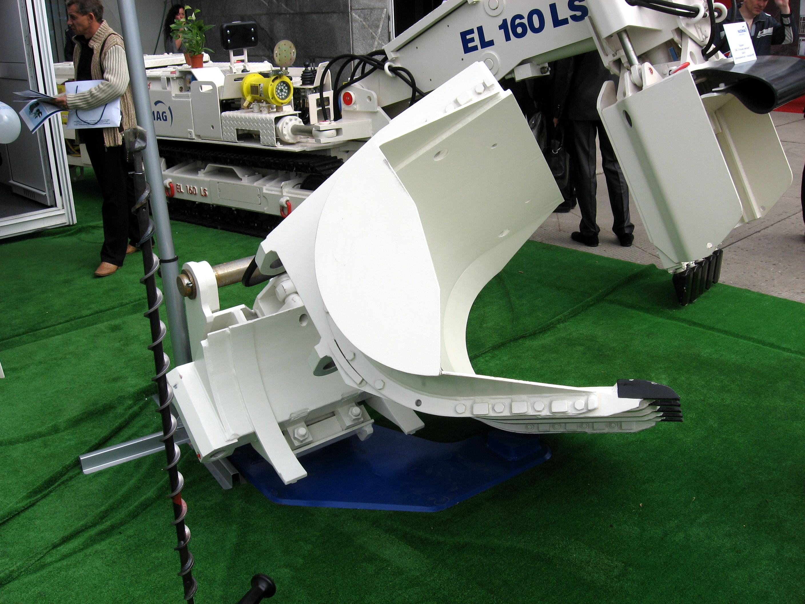 Фото з виставки Вугілля-Майнінг 2010